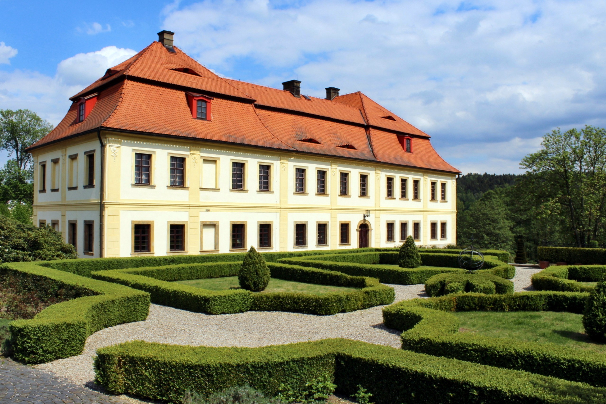 Palmeho dvůr v Jablonném-Markvarticích